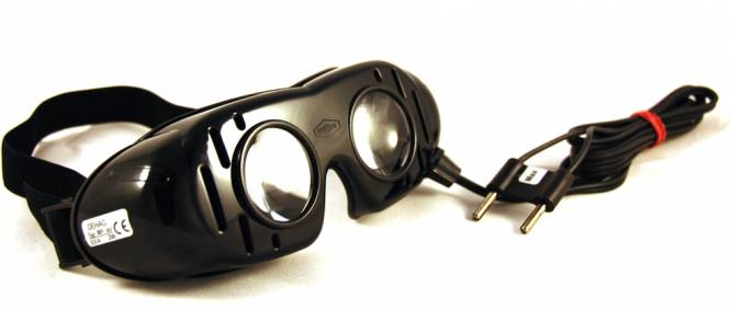 Die Frenzelbrille, auch genannt Nystagmusbrille nach Frenzel, nach Prof. Frenzel wird zur Erkennung von einem Nystagmus verwendet